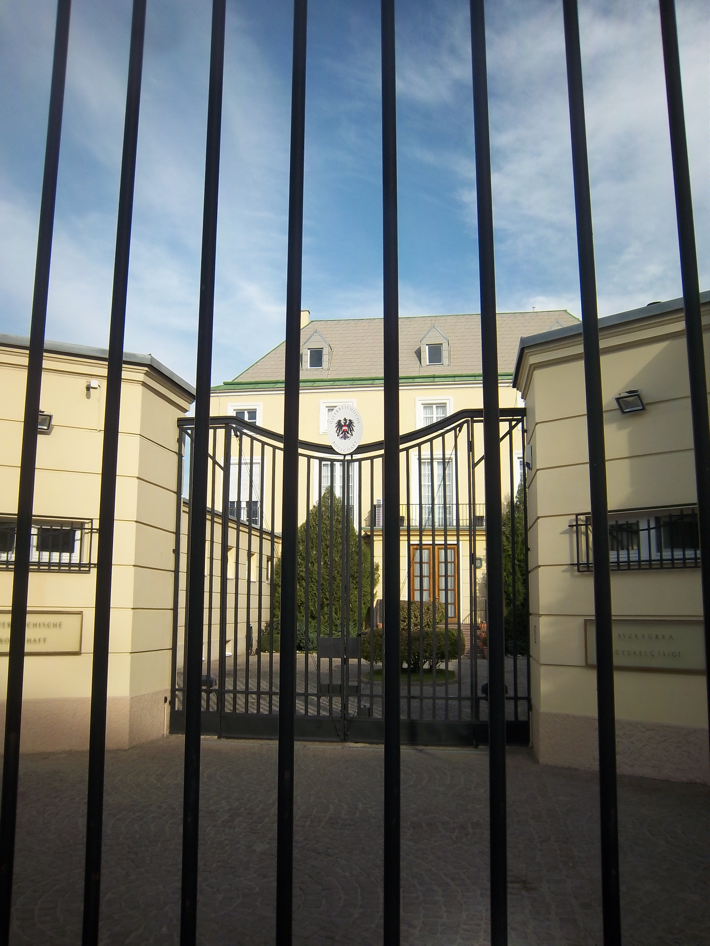 Österreichische Botschaft in Ankara (Türkei) Srpskohrvatski / српскохрватски: Ambasada Austrije u Ankari.